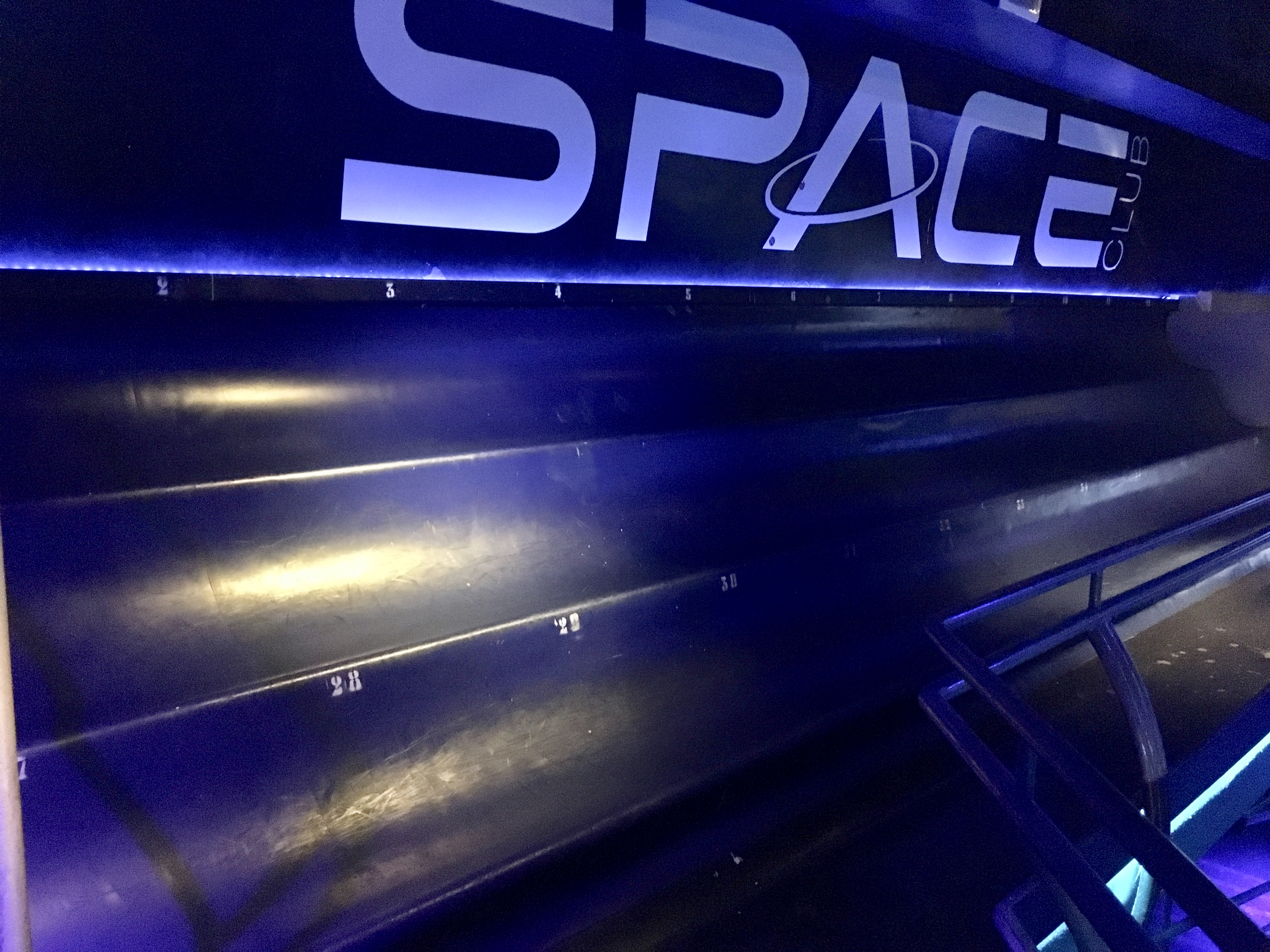 Space Electronic, discoteca di Firenze